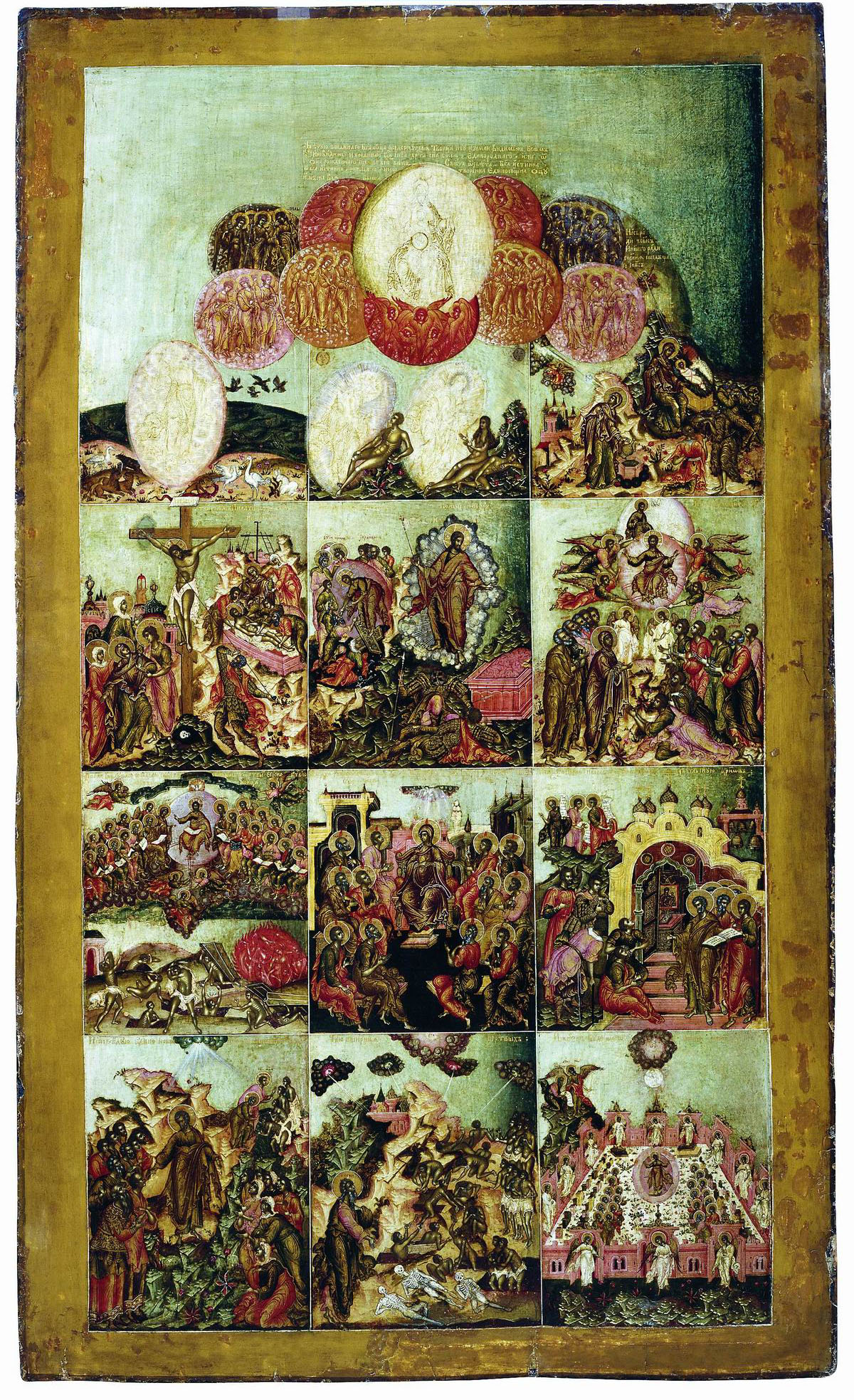 Символ веры. 1668 Симон Ушаков, Гурий Никитин Государственный Русский музей